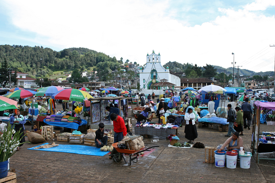 San Juan Chamula, Market Square